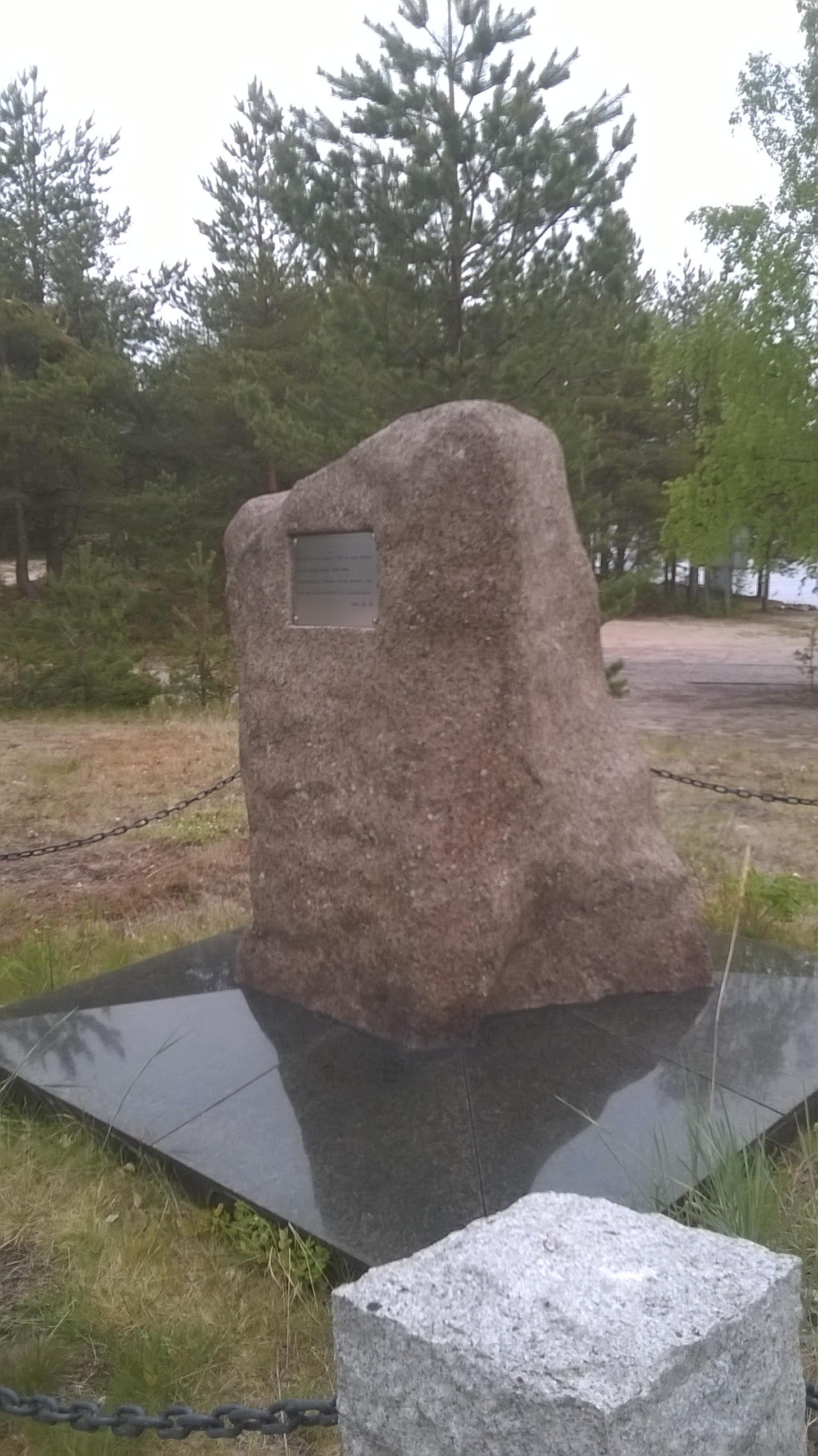 Minnesstenen i Pitsund